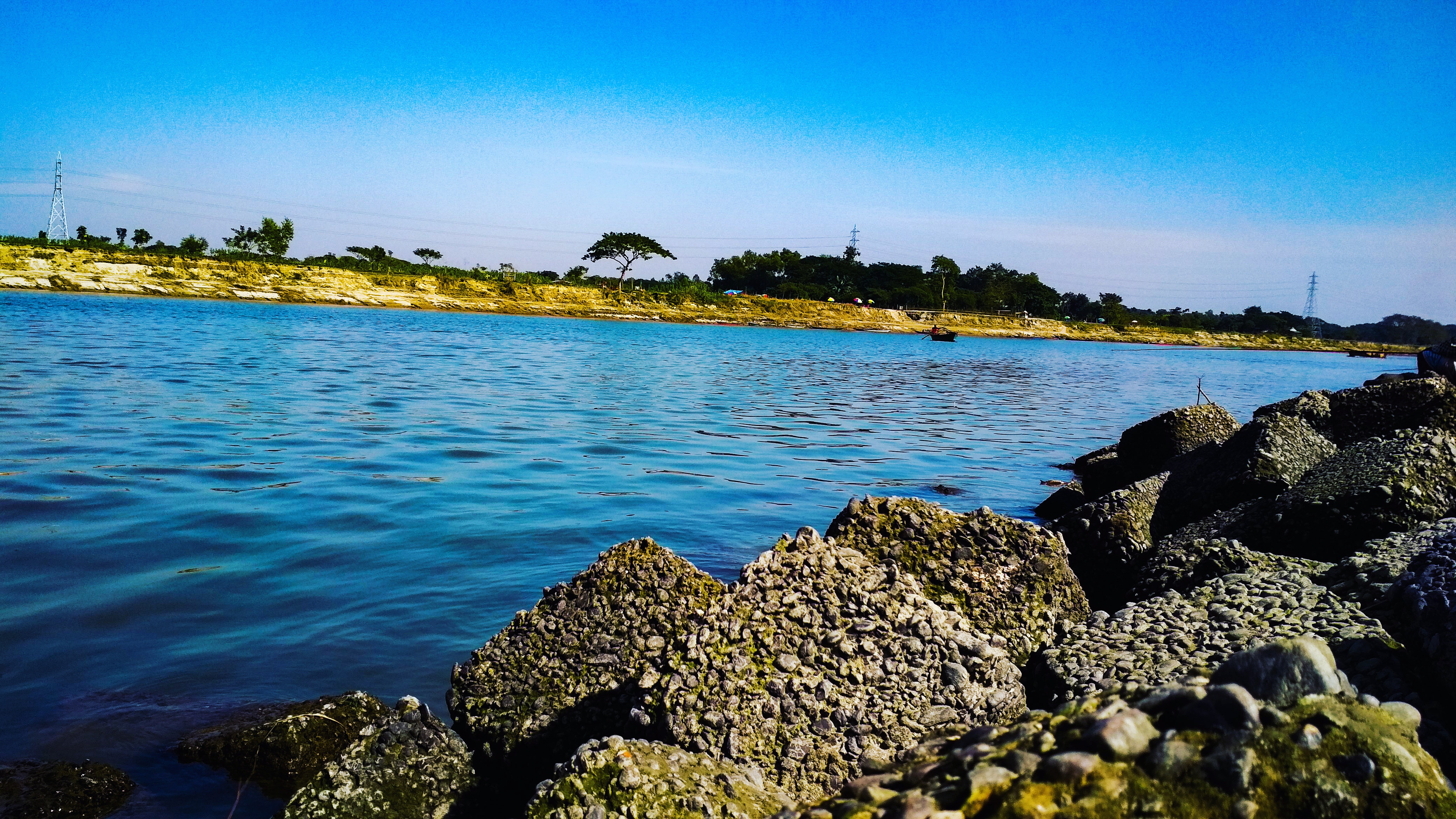 পুরাতন ব্রহ্মপুত্র নদ ময়মনসিংহ